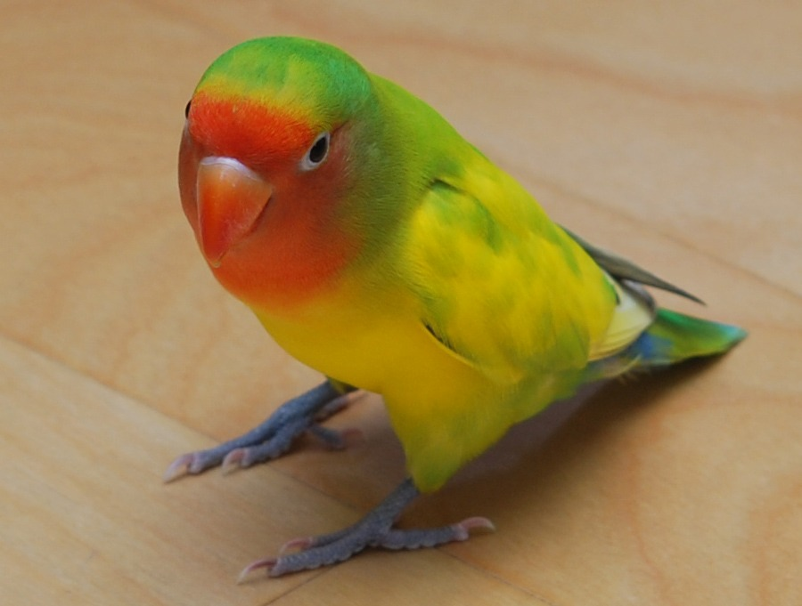 Questo esemplare è un ibrido tra A. roseicollis e A. fischeri, gli ibridi sono sterili.